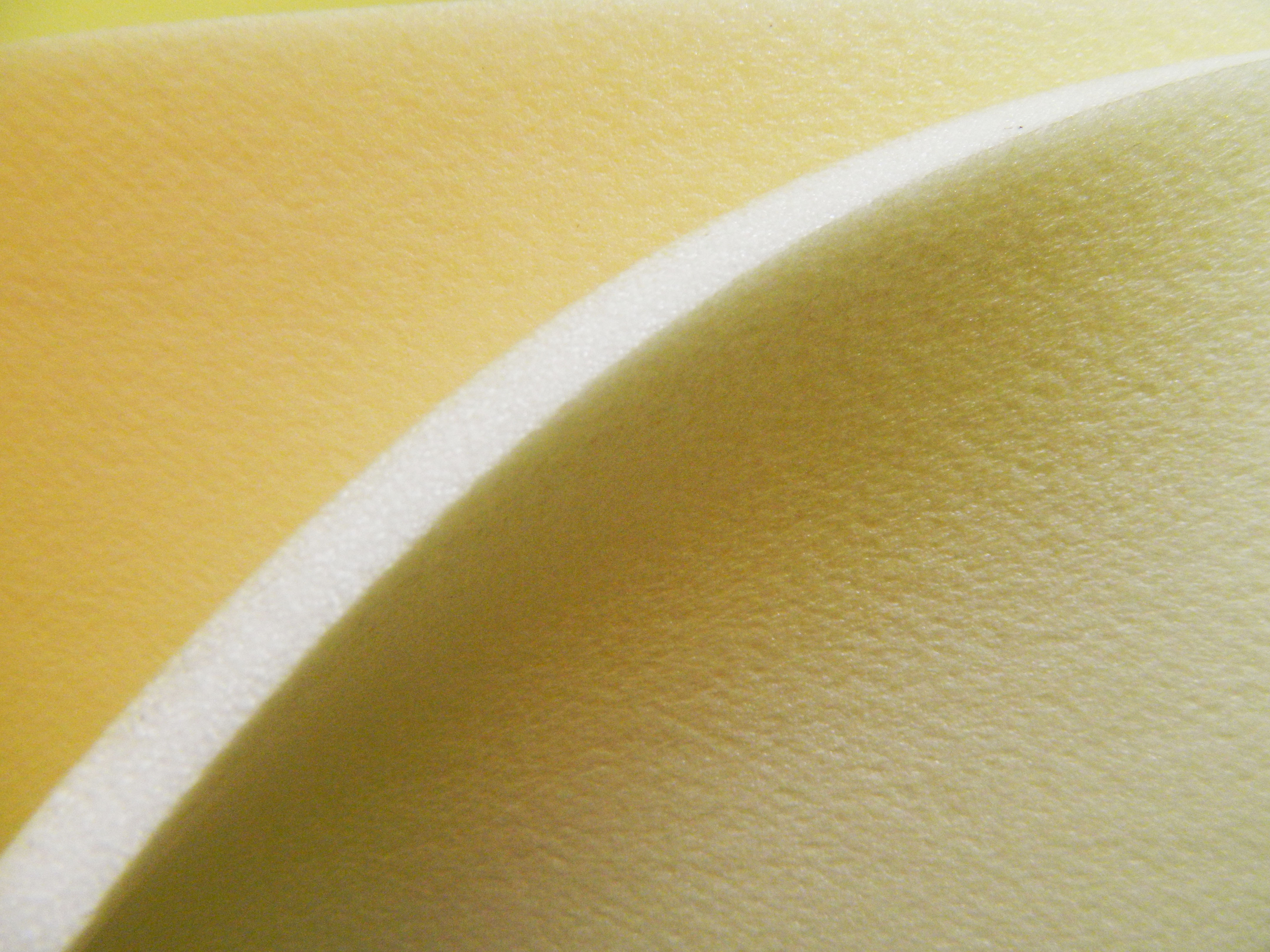 Химически сшитый пенополиэтилен с характерной шершавой поверхностью